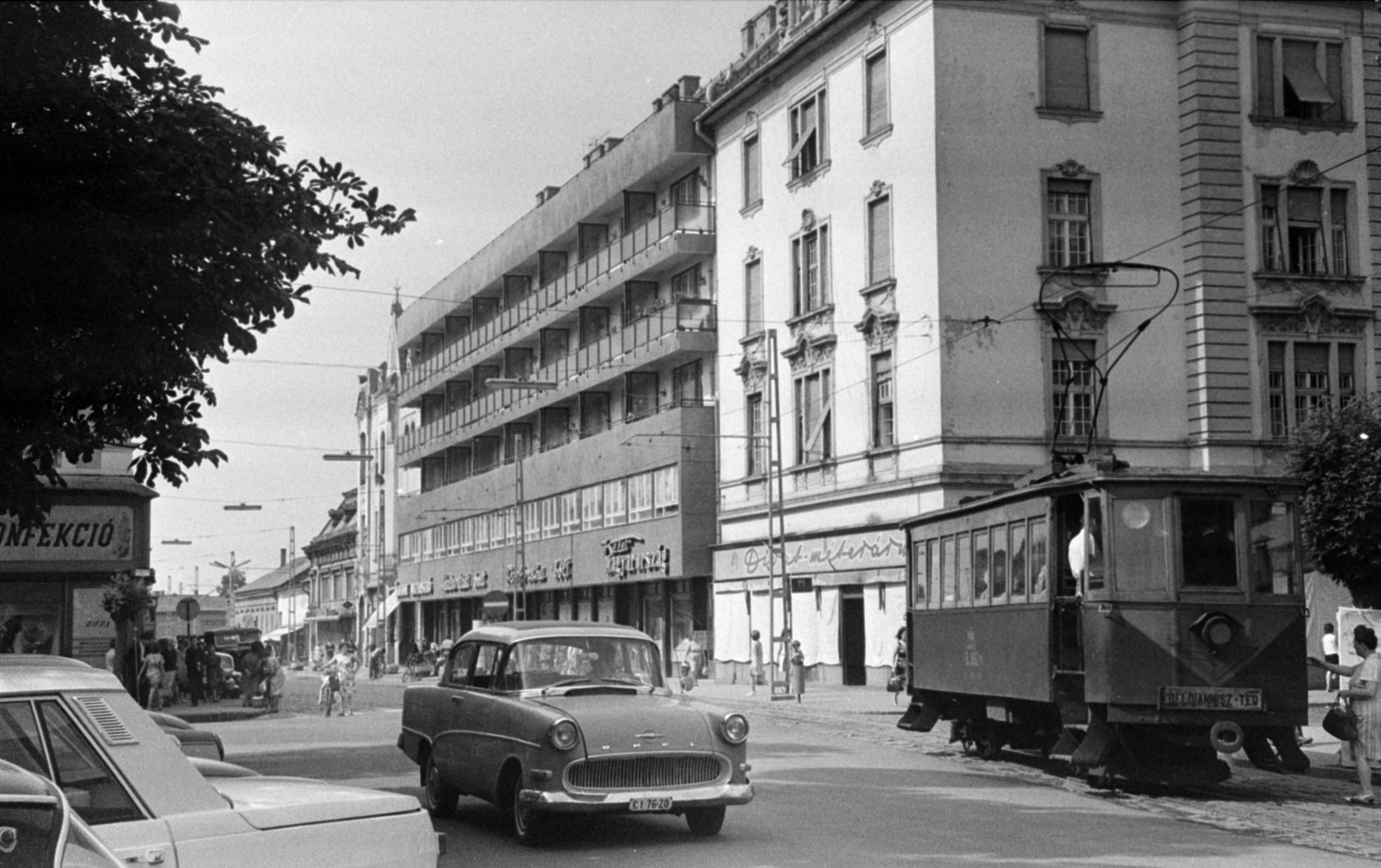 Villamos a nyíregyházi Zrínyi Ilona utcában